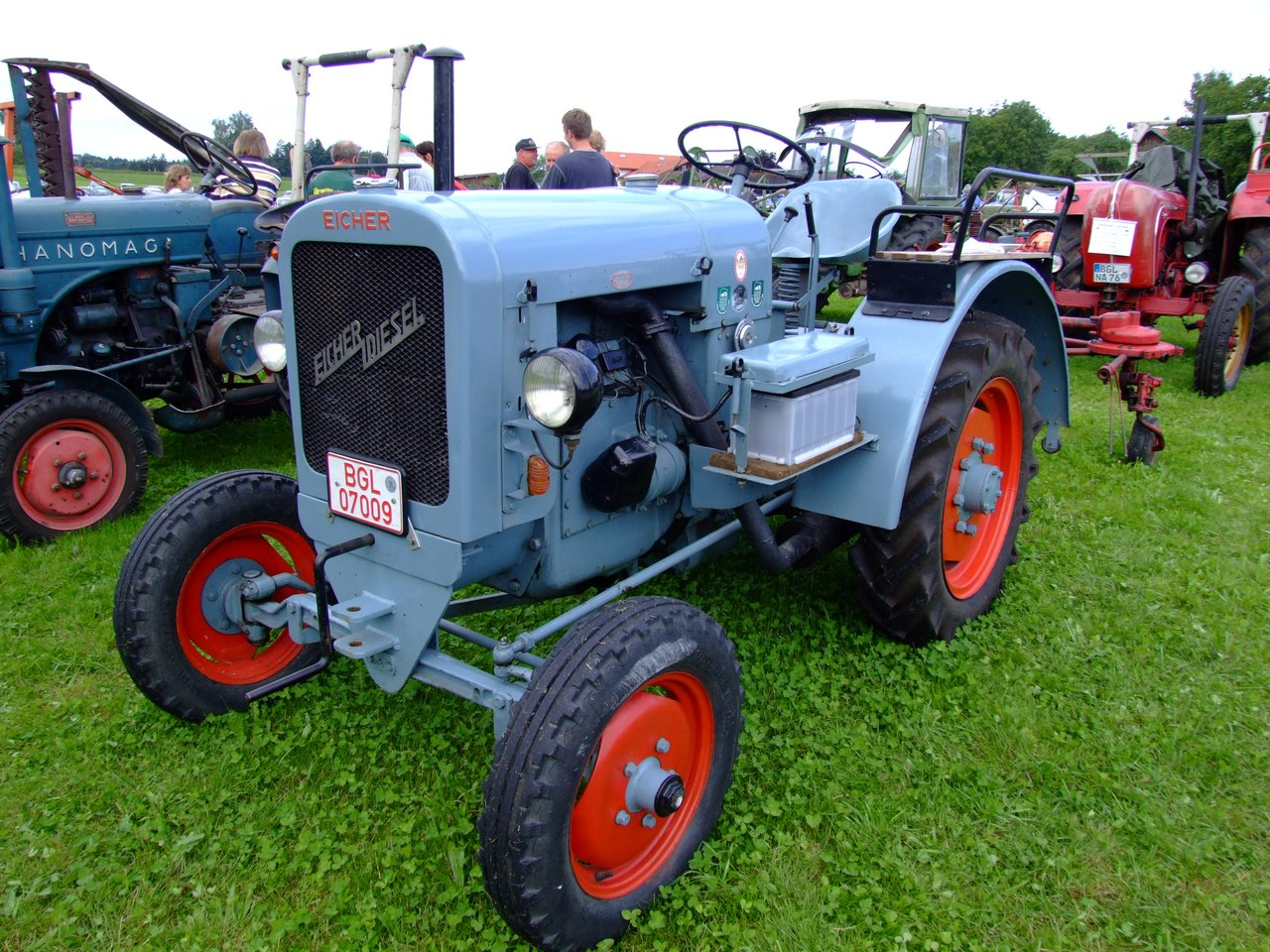 Quelle: selbst fotografiert, 08/2006 Fotograf: Späth Chr.